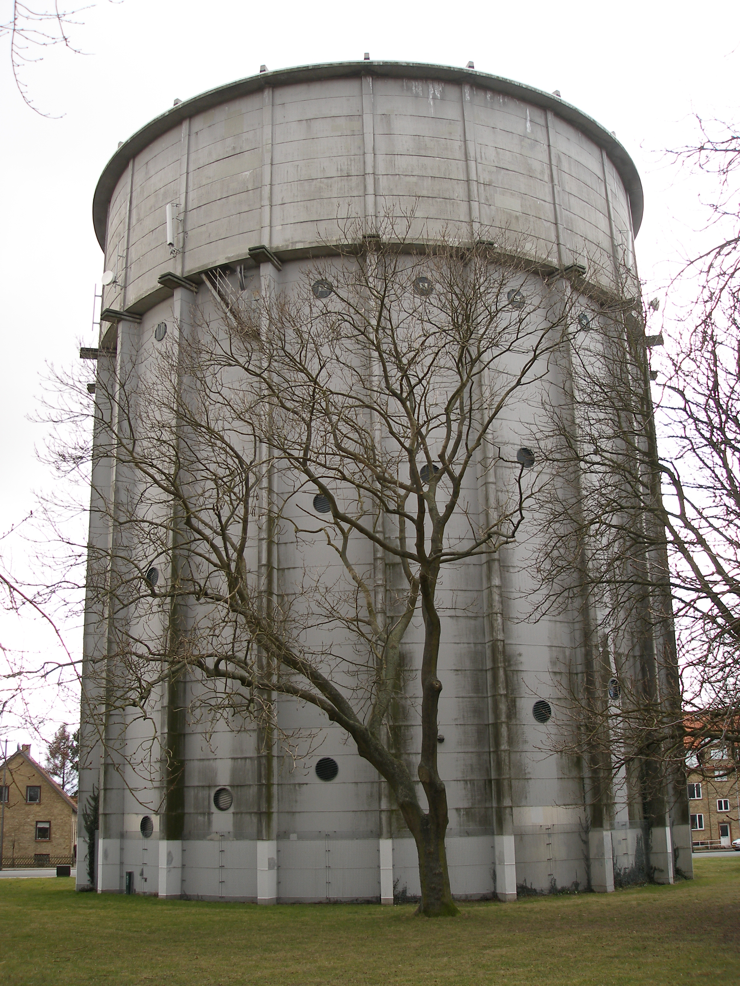 Brønshøj Vandtårn, Brønshøjvej, Københavns Kommune